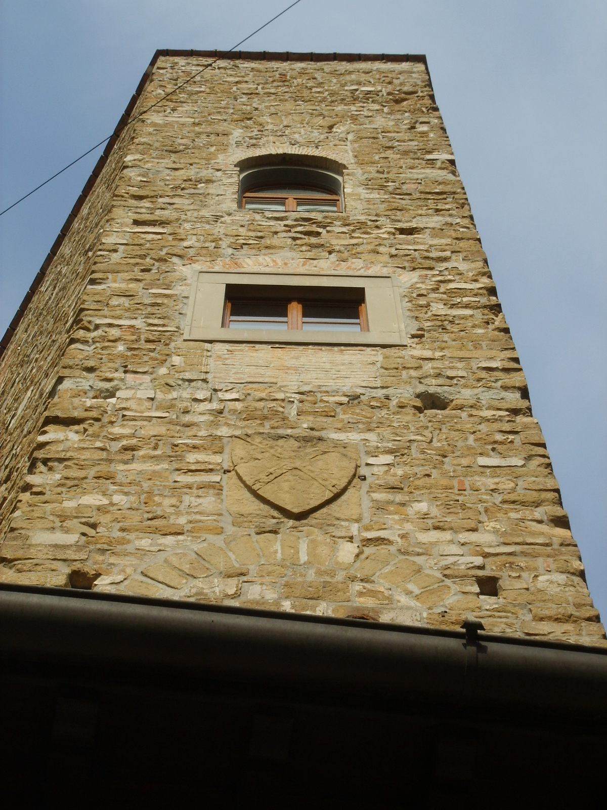 Torre degli alberti